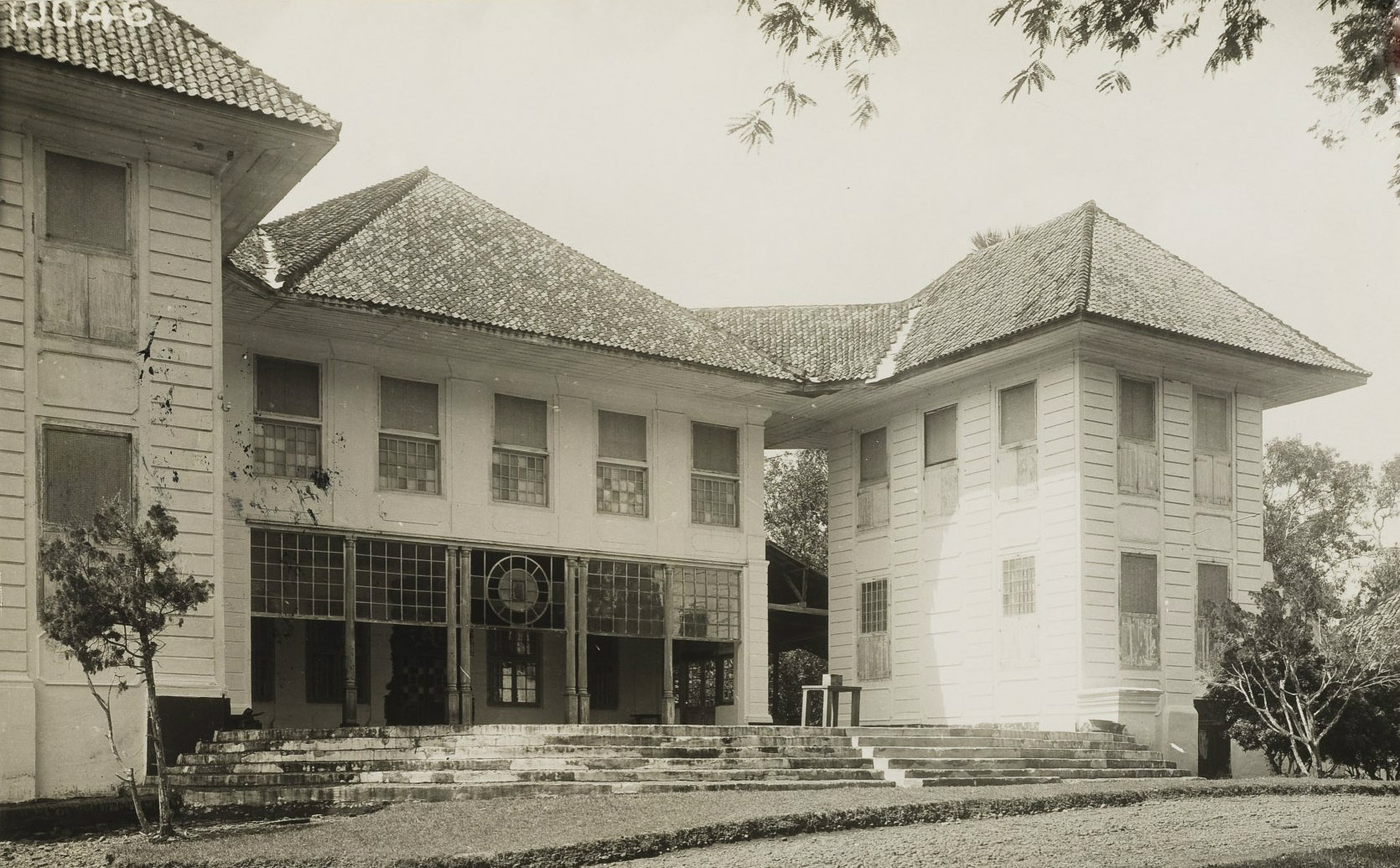 Achterzijde van Huis Groeneveld (Huis Tandjoeng-Oost) in Meester Cornelis te Batavia. Image code: 107050 Date: Circa 1930 Object type: Foto Technique: Ontwikkelgelatinezilverdruk (OGZ) Additional: Oude Hollandsche buitenplaatsen van Batavia / V.I. van de Wall. - Deventer : Van Hoeve, [1943]. - 2e verm. dr. - Oorspr. uitg.: 1931 o.d.t.: Indische landhuizen en hun geschiedenis. - p. 49-78 OD 10046 Provenance: Onbekend Size: 12,5x17,5cm Old signature: 9732/11121/2.30.58